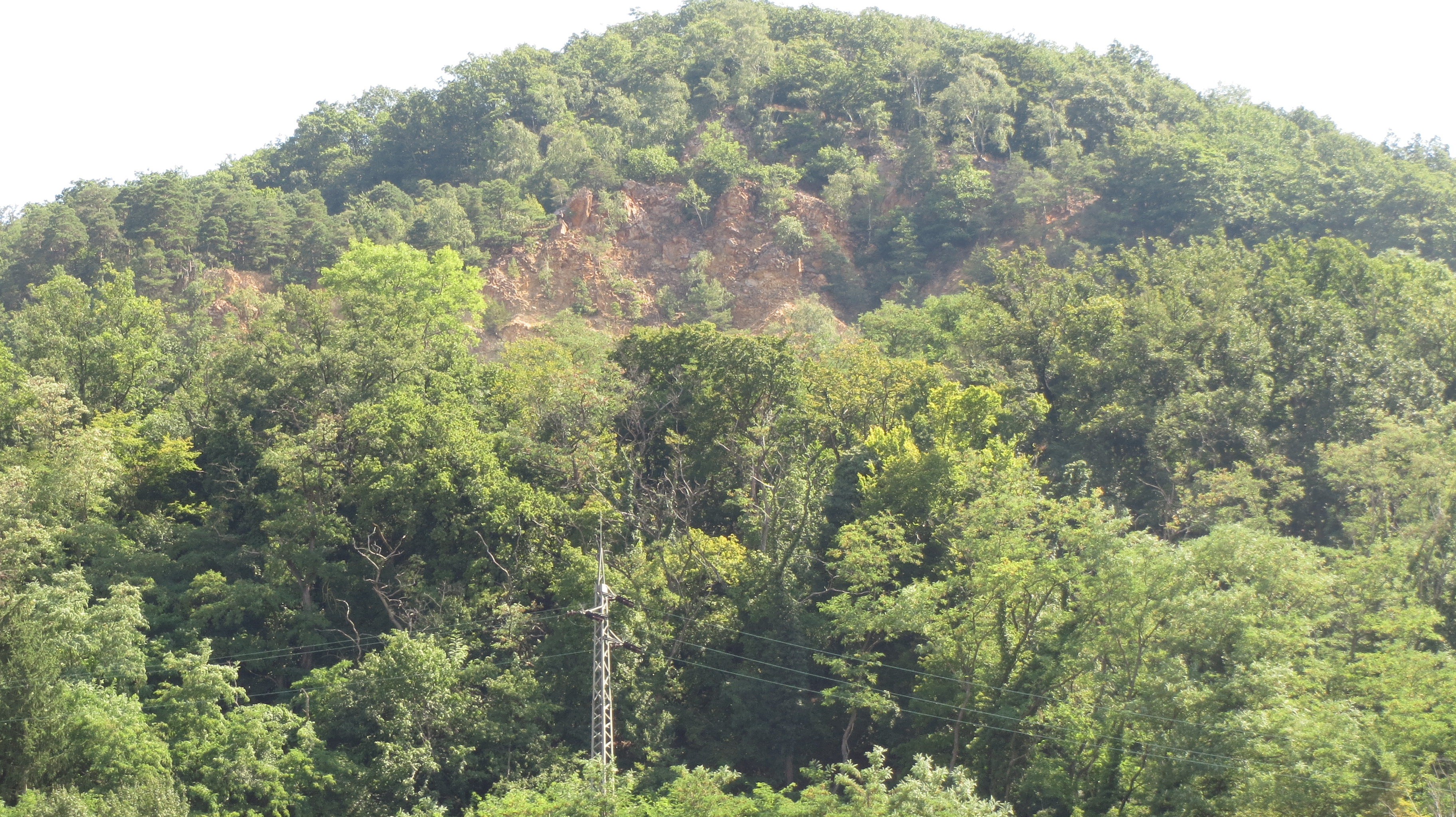 Der Kirchbergbruch ist die älteste Stelle von Porphyrabbau in Dossenheim, Blick von Westen